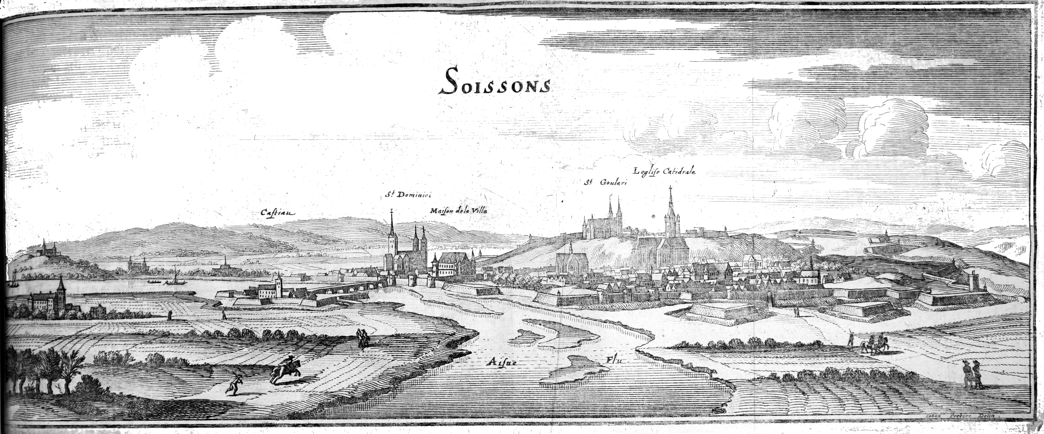 présenté dans "TOpographiae Galliae".